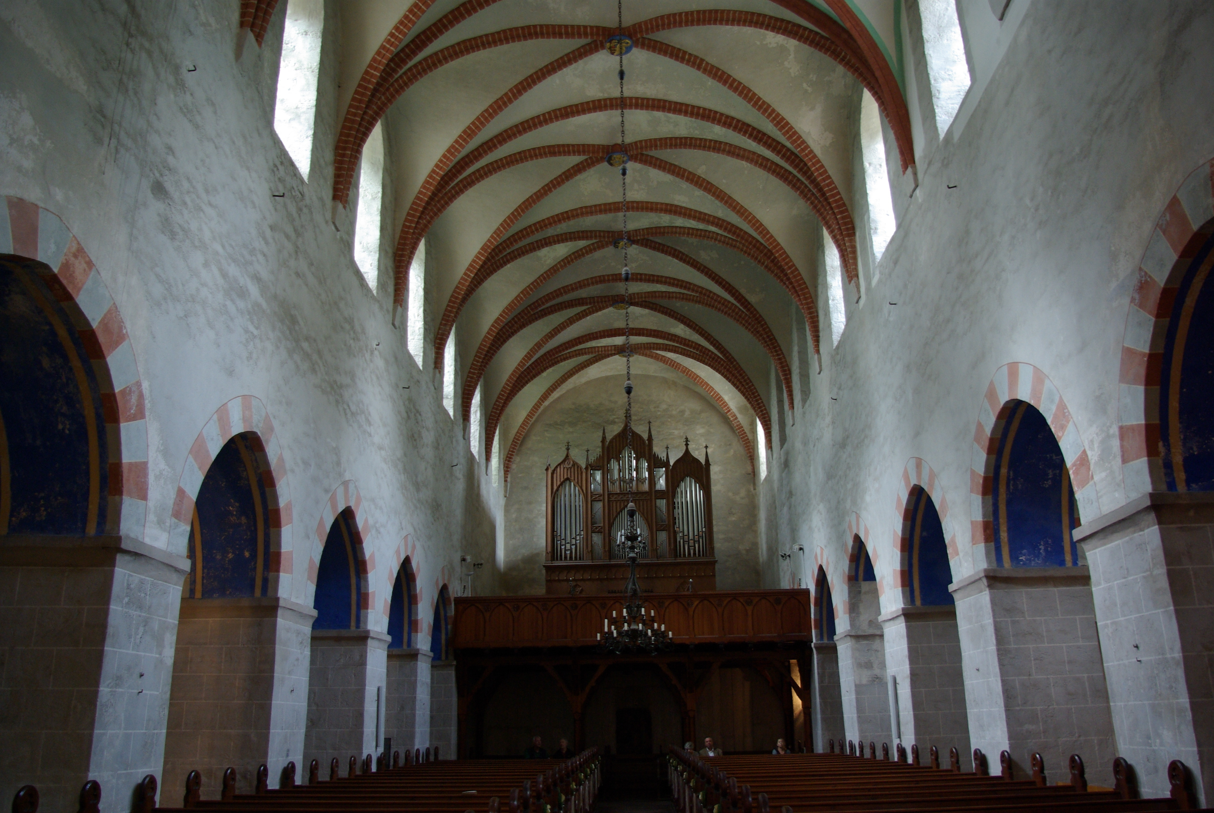 Jüterbog in Brandenburg. Das Bild zeigt das Schiff mit der Orgel im Kloster Zinna